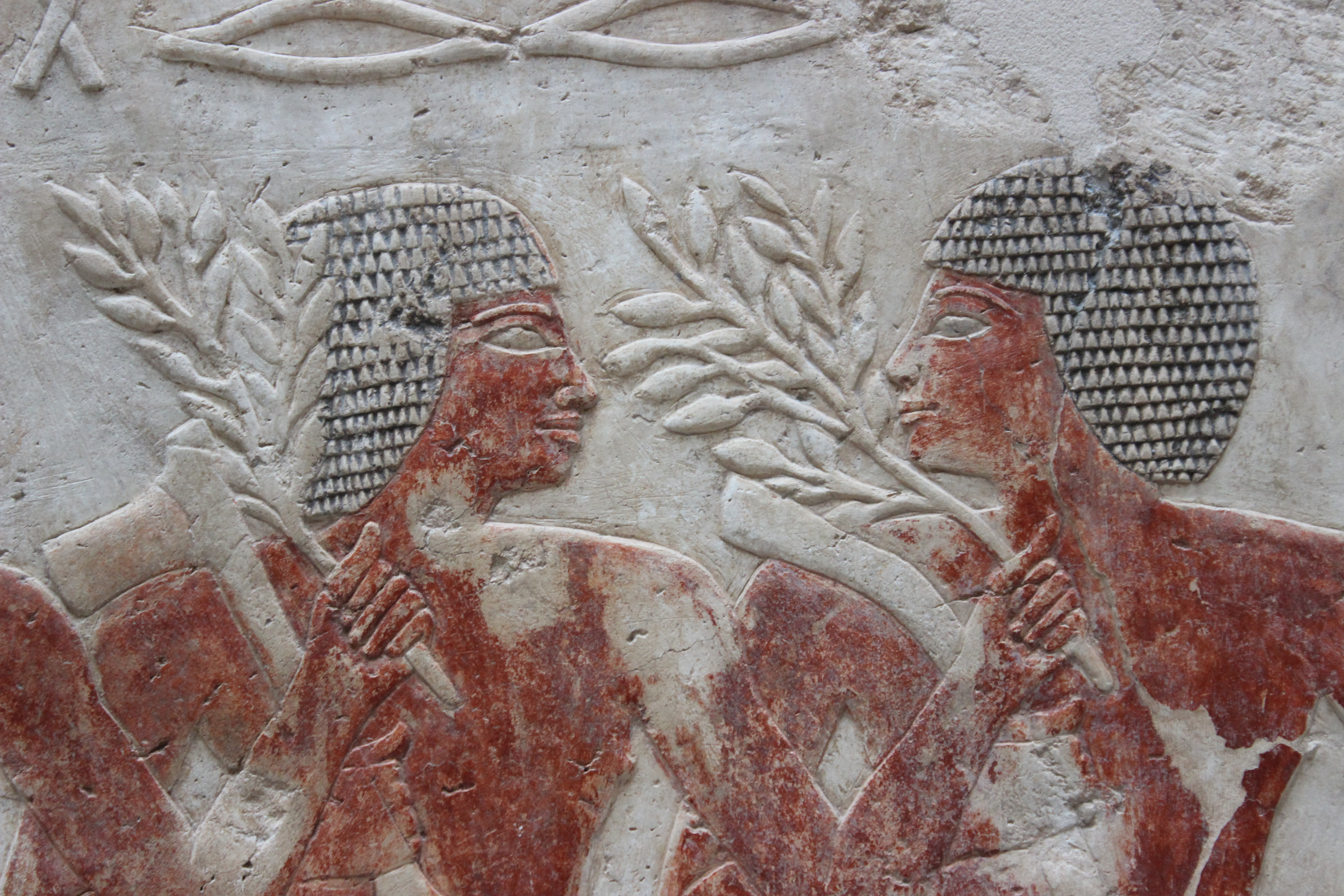 Berlín. Neues Museum. Relieve del templo funerario de Hatsepsut.